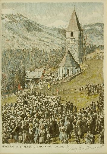 Bsatzig im Schanfigg: in St. Peter, kurz nach 1935